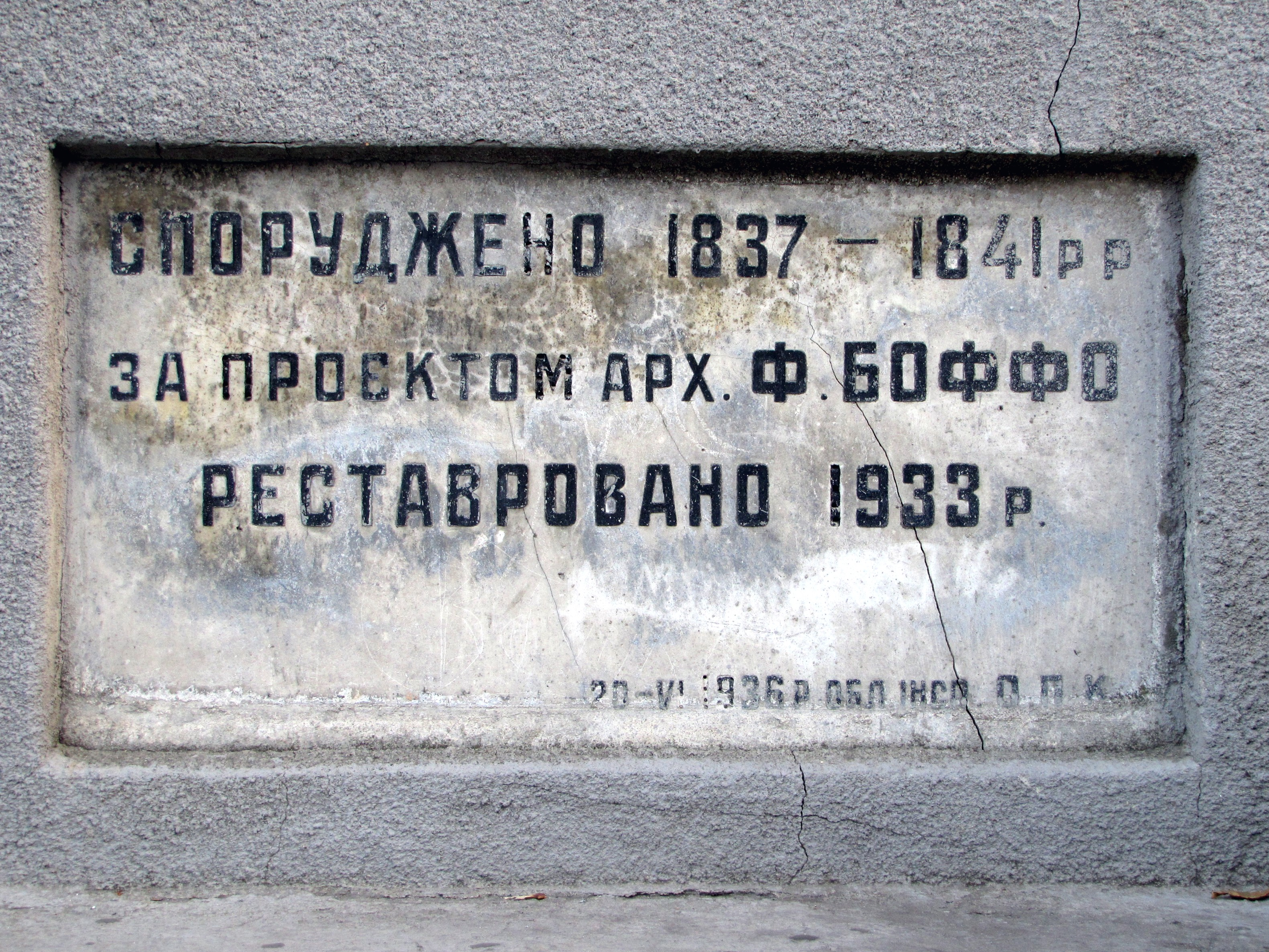 Pamětní deska z roku 1936 v horní části Potěmkinových schodů v Oděse. Připomíná výstavbu schodů v letech 1837-1841 italským architektem Francescem Boffem a jejich rekonstrukci v roce 1933. Text v ruštině: СПОРУДЖЕНО 1837-1841 ЗА ПРОЕКТОМ АРХ. Ф. БОФФО. РЕСТАВРОВАНО 1933